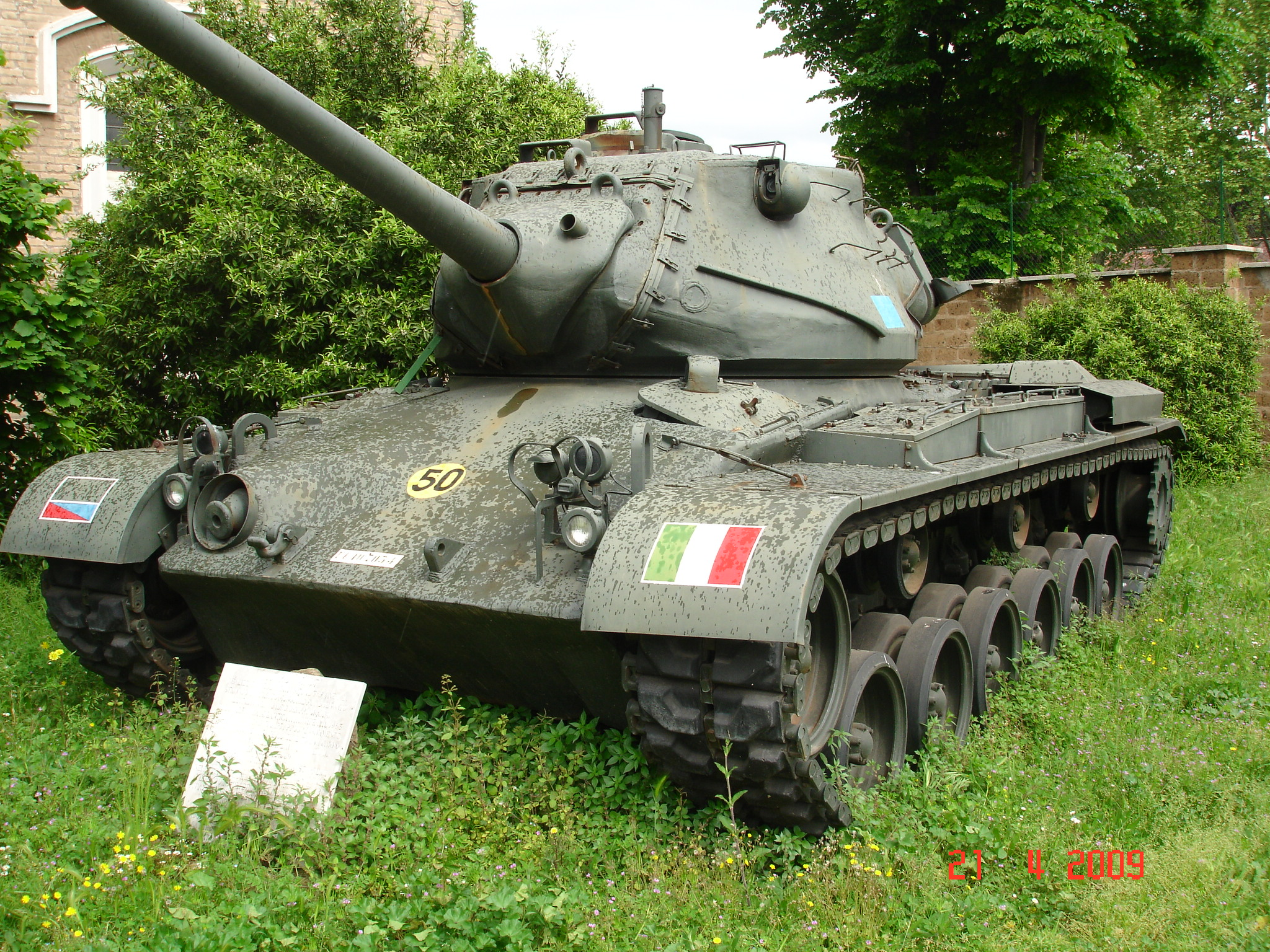 Carro M47 esposto al Museo Storico dei Carristi situato in Roma.